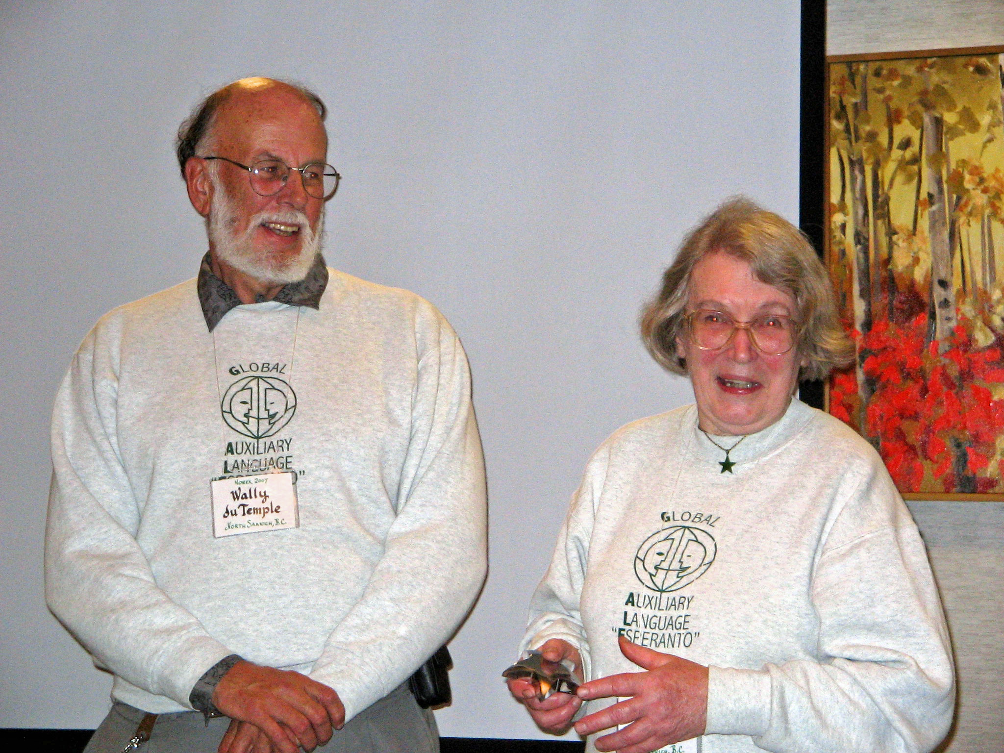 Wally kaj Olga du Temple dum NOREK en Sidney (Brita Kolumbio) la 22-an de septembro 2007. Fotis Paul Hopkins.